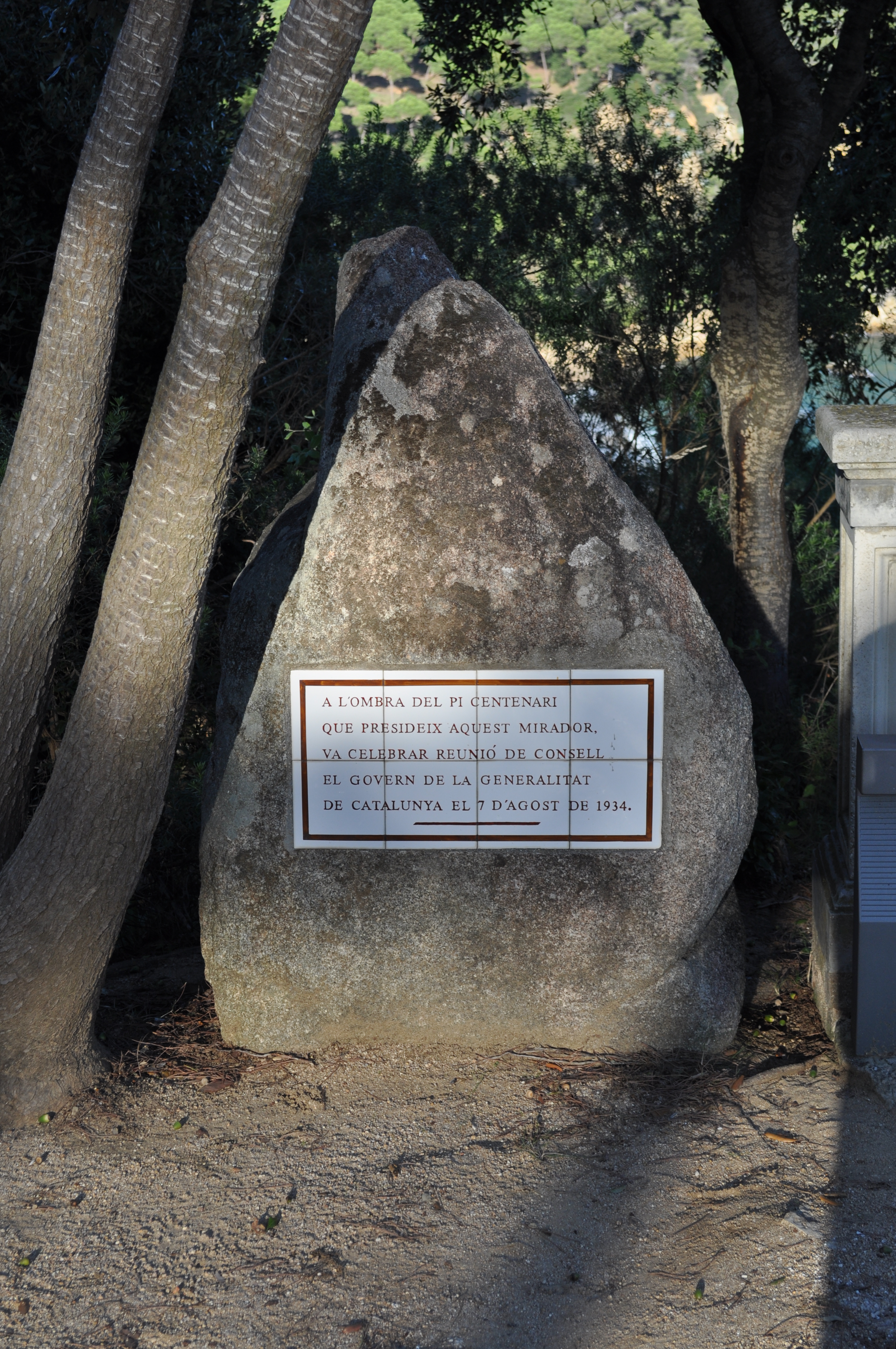 Lloret, Ermita de Santa Cristina, Gedenkstein Generalitat